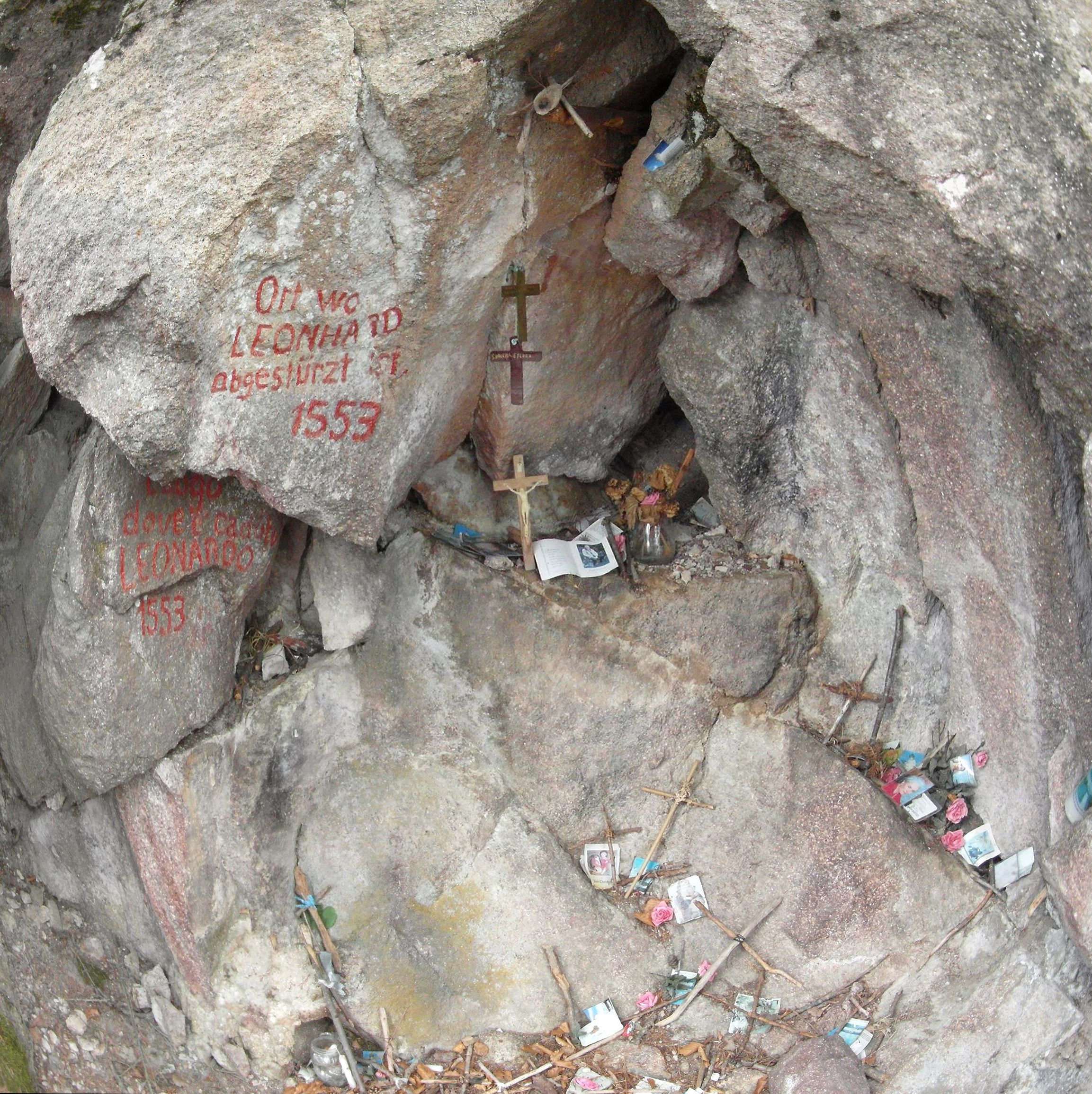 Santuario di Pietralba - Luogo caduta di Leonard